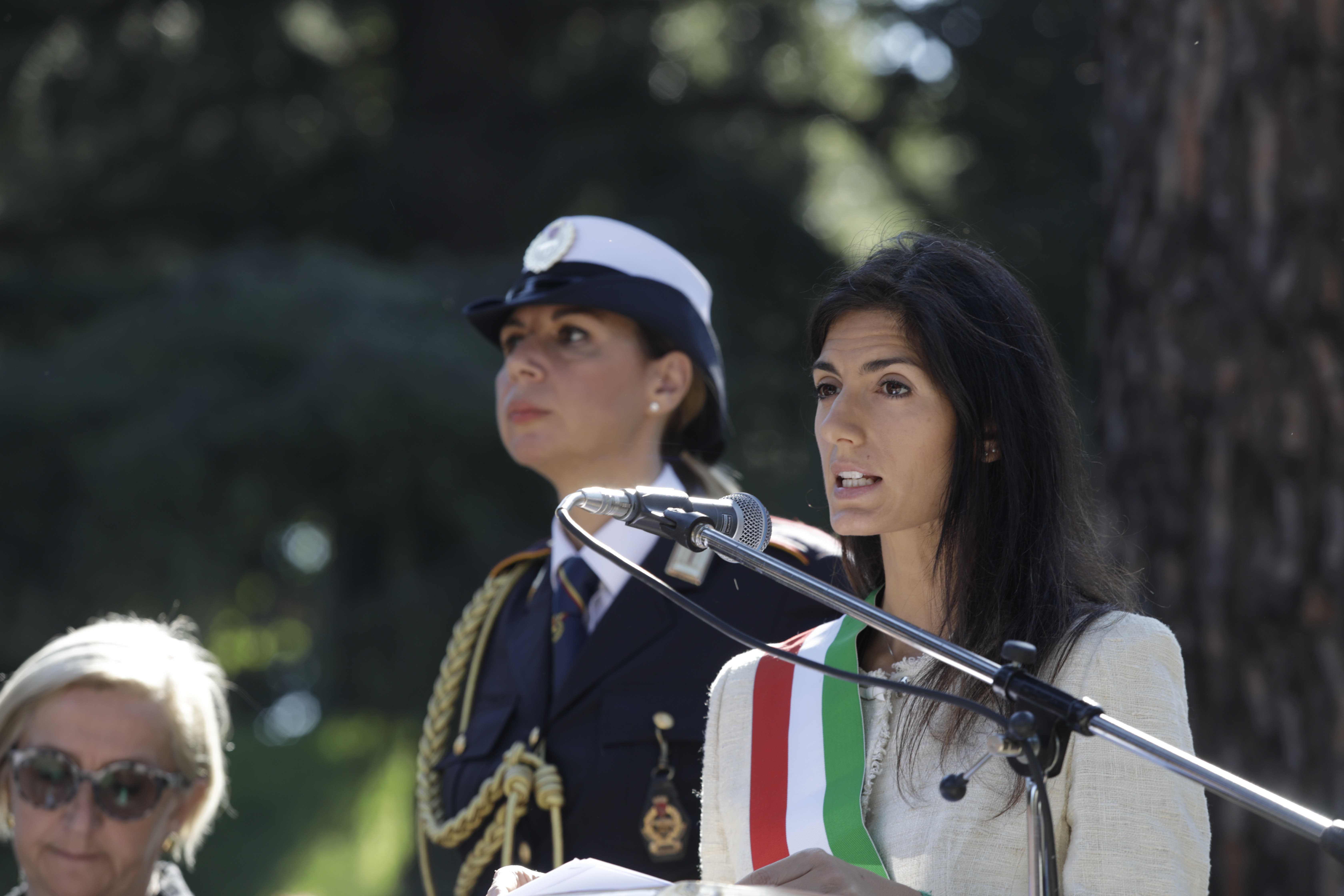 Develación de escultura de Monseñor Romero.